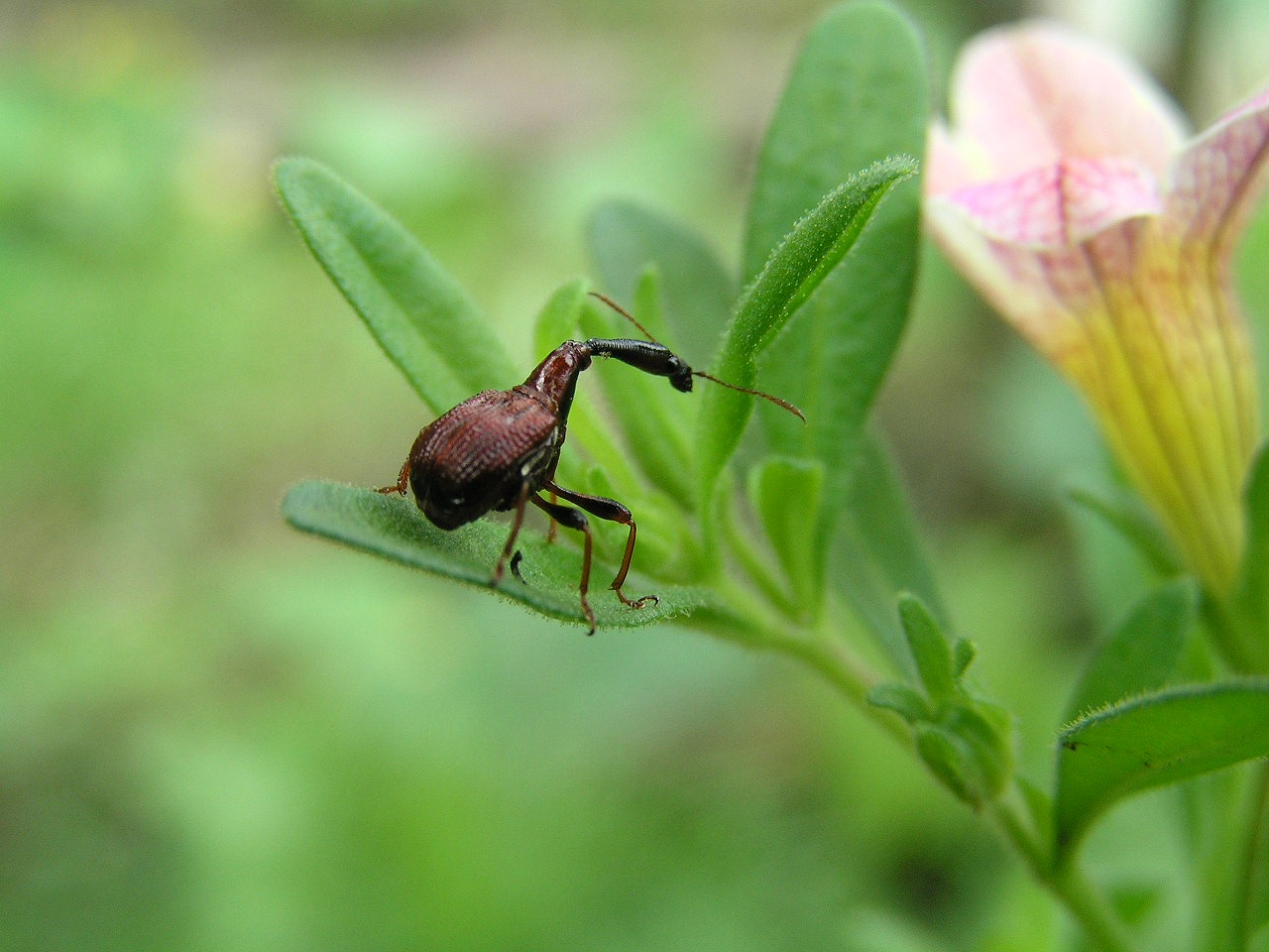 ペチュニアの葉に止まるヒゲナガオトシブミ